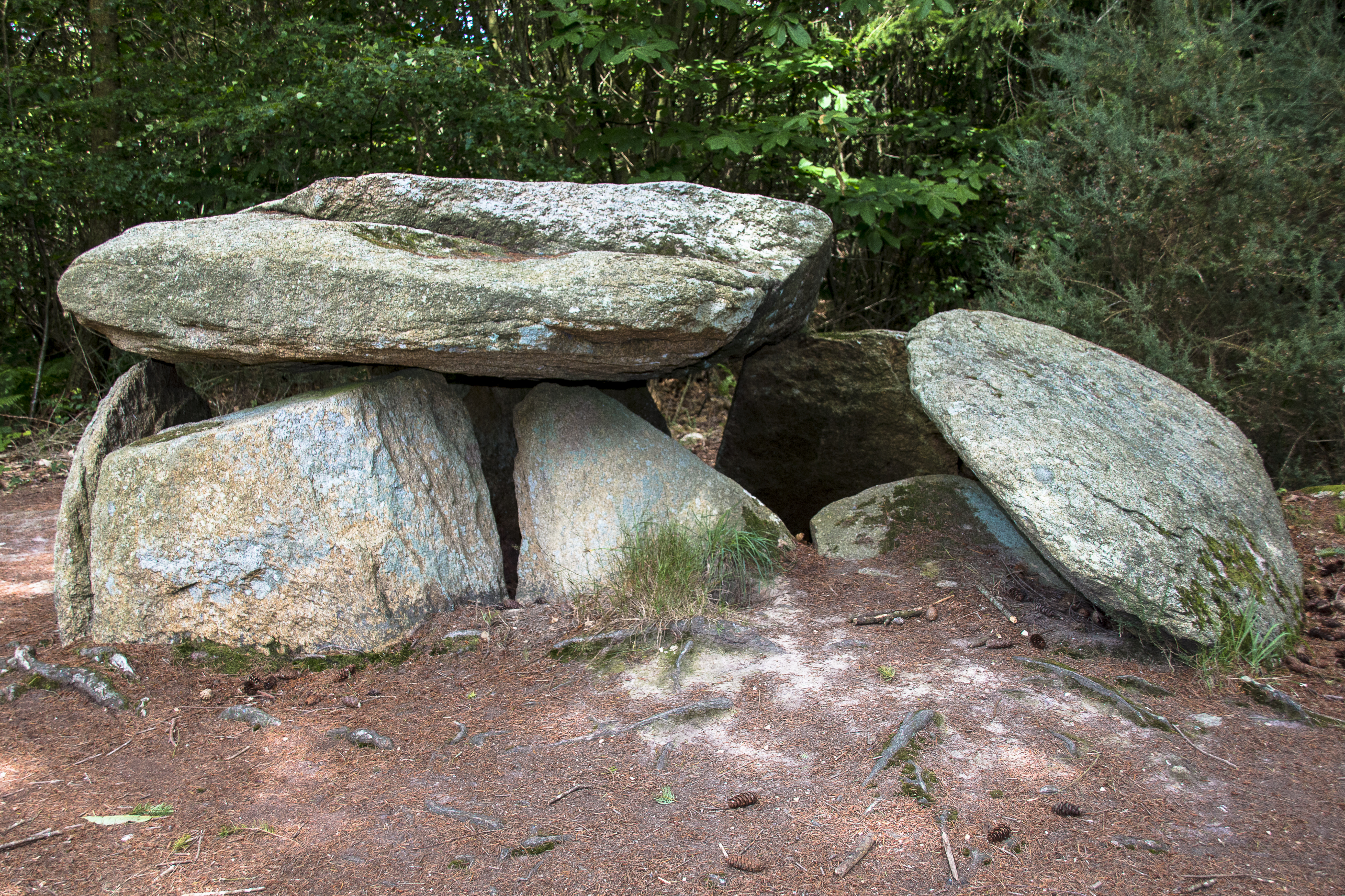 Dolmen des Follets (Saint-Gravé)